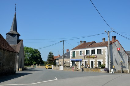 La Buxerette (Indre) - Place de l'église